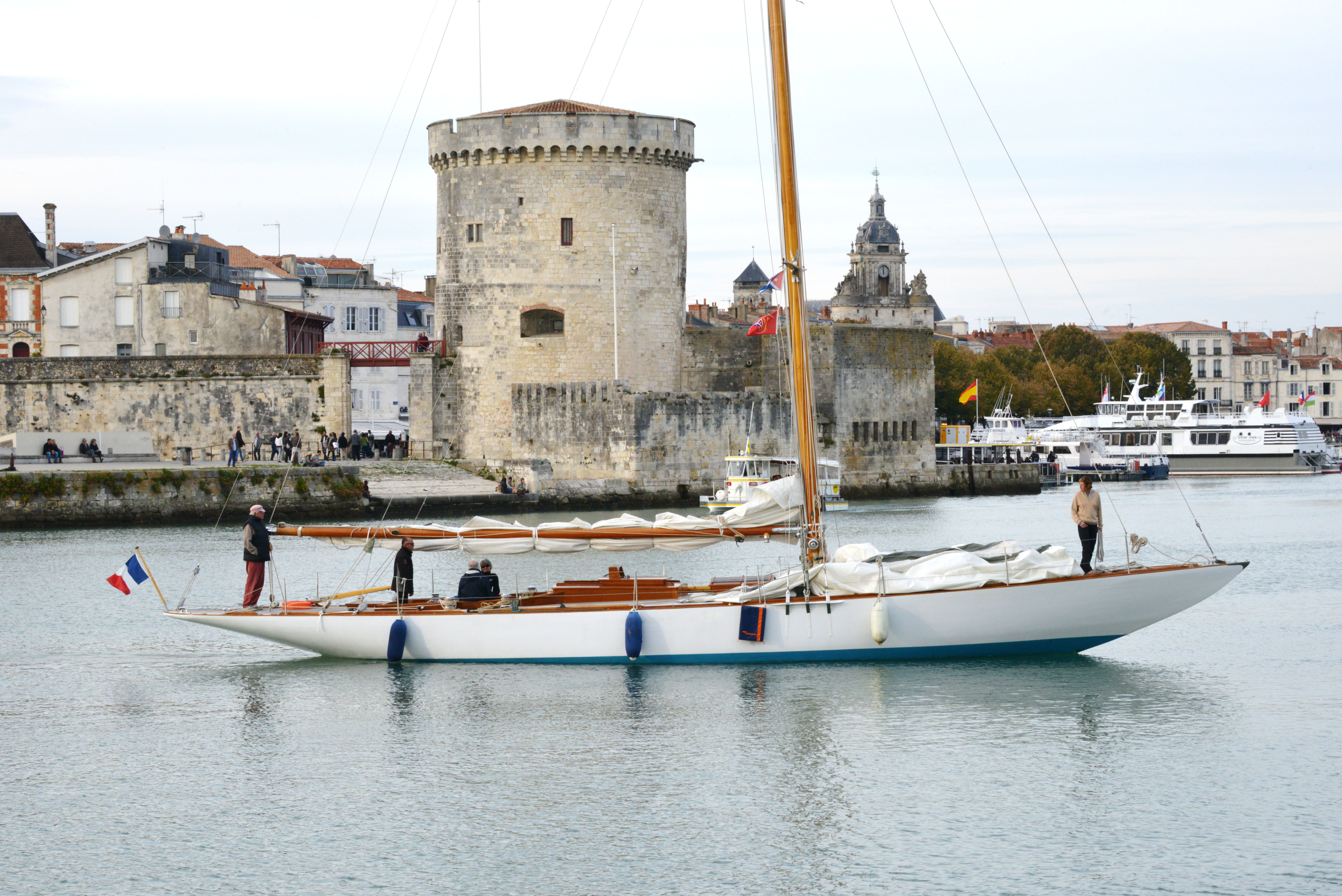 Le voilier de plaisance « LASSE » dans l’avant-port de La Rochelle. Ce voilier a été construit au Danemark en 1940 sur un plan Johan Anker. Il mesure 18,25 mètres de long (LHT) et 3,34 mètres de large. Sa coque est en bois. Immatriculation : BA E402814. « LASSA » est labellisé BIP (Bateau d’Intérêt Patrimonial). La Rochelle, Charente-Maritime, France.